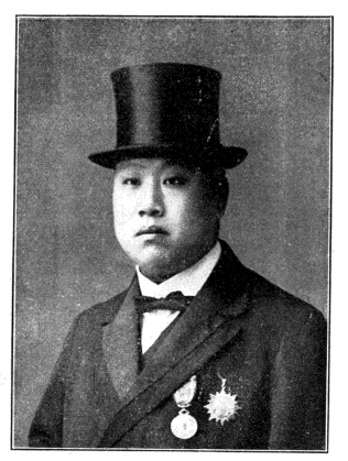 中文（台灣）: 中華民國國會議員